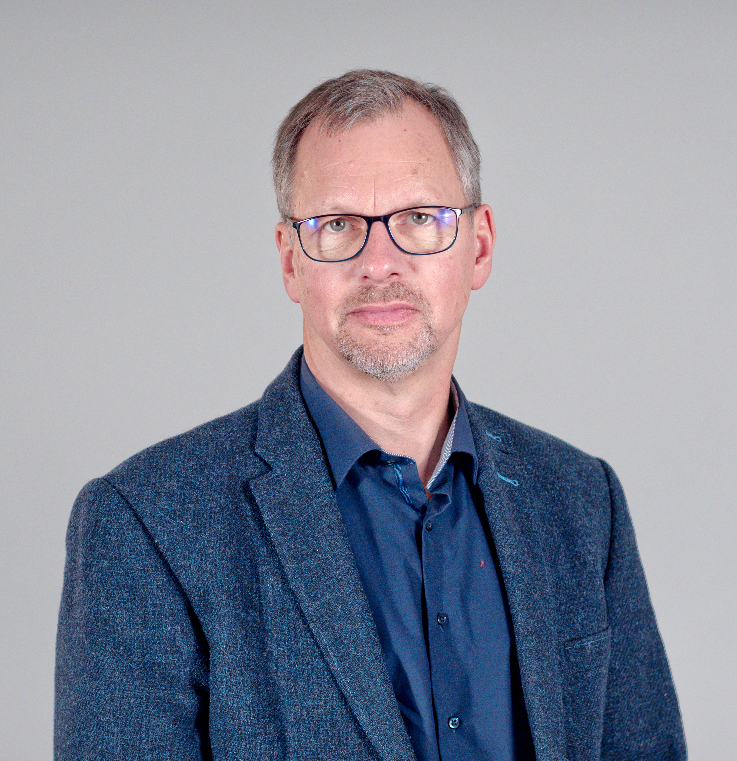 Prof. Markus Kalesse, 2017